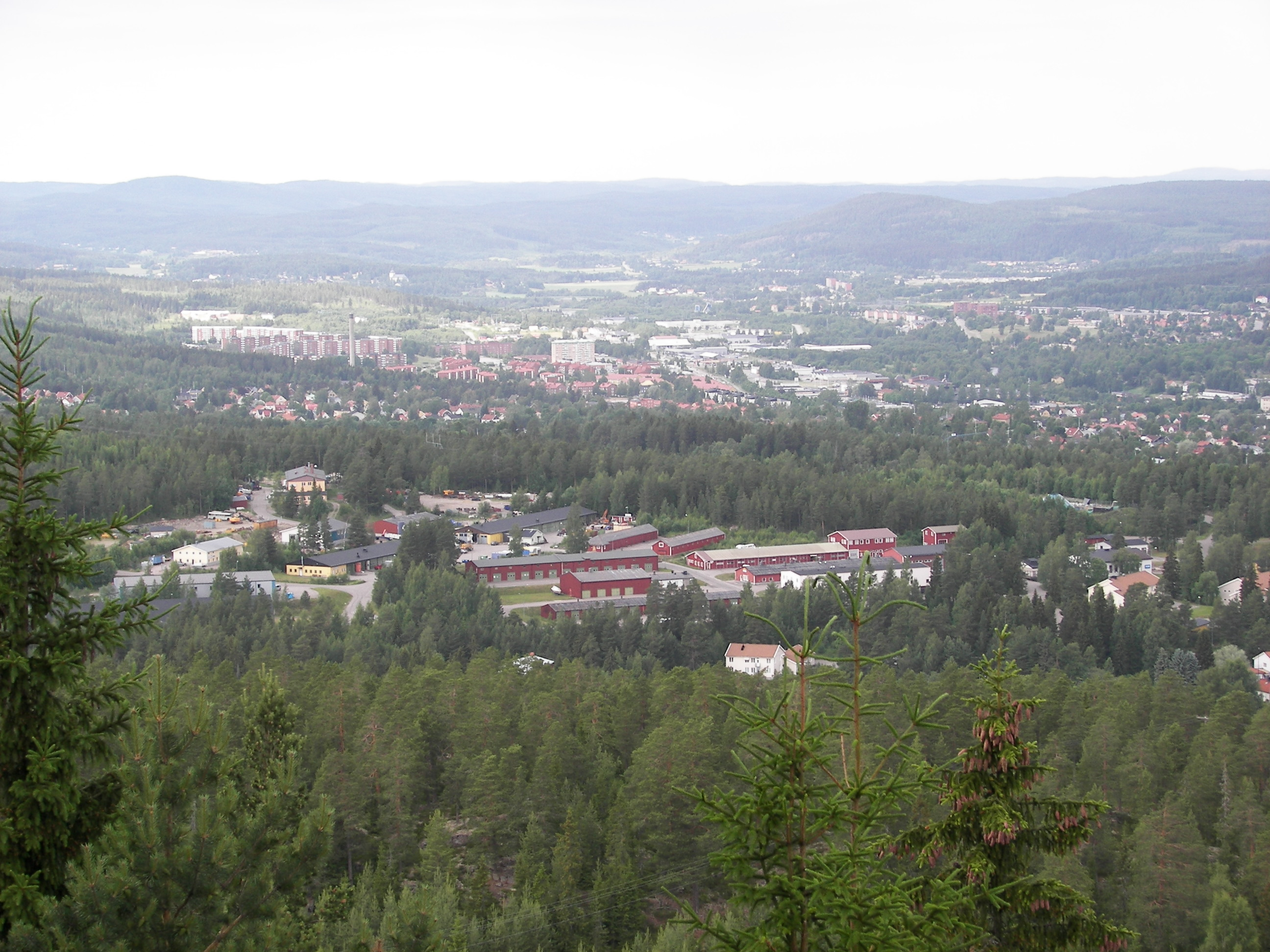 Före detta Sundsvalls luftvärnsregementes område 2007 sett från Södra stadsberget